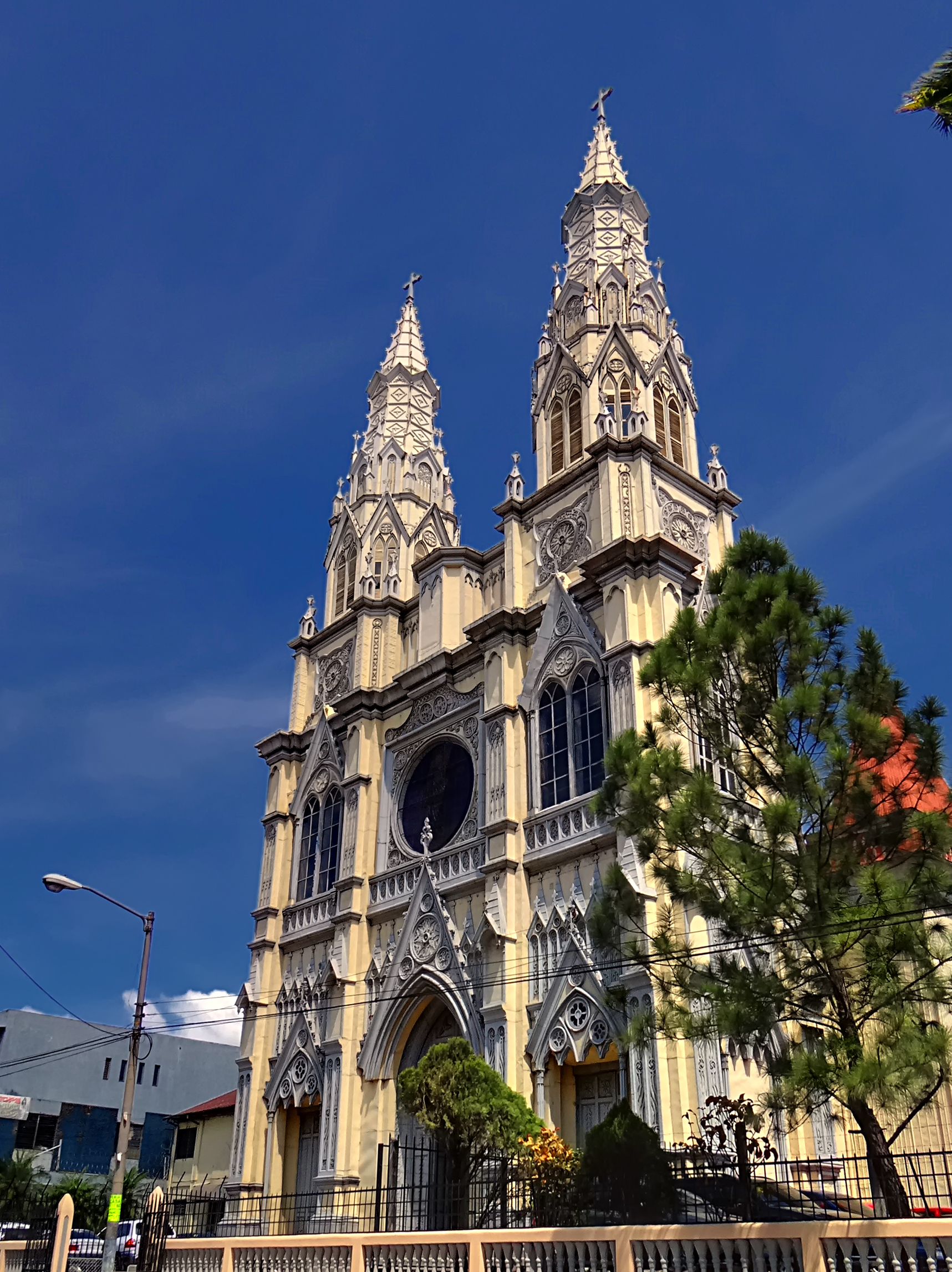 Fachada de la Iglesia Sagrado Corazón de Jesus